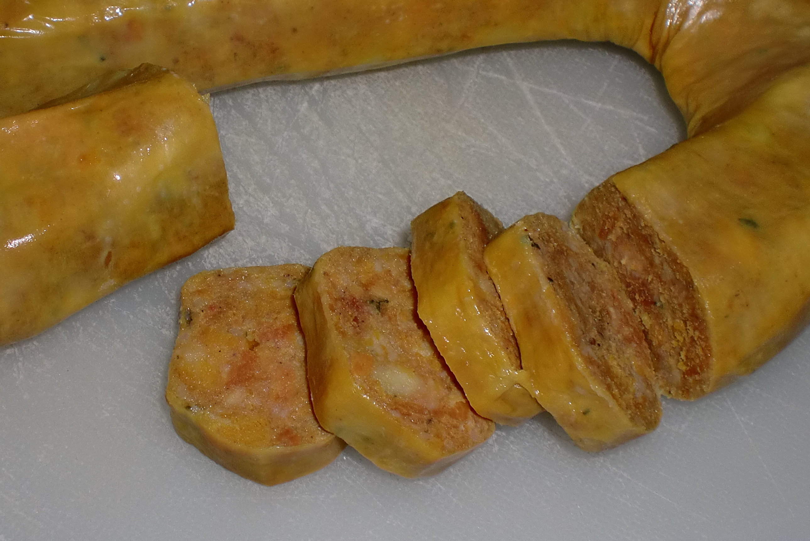 Morcilla de huevo o morcilla blanca. Gastronomía de Jaén (España)